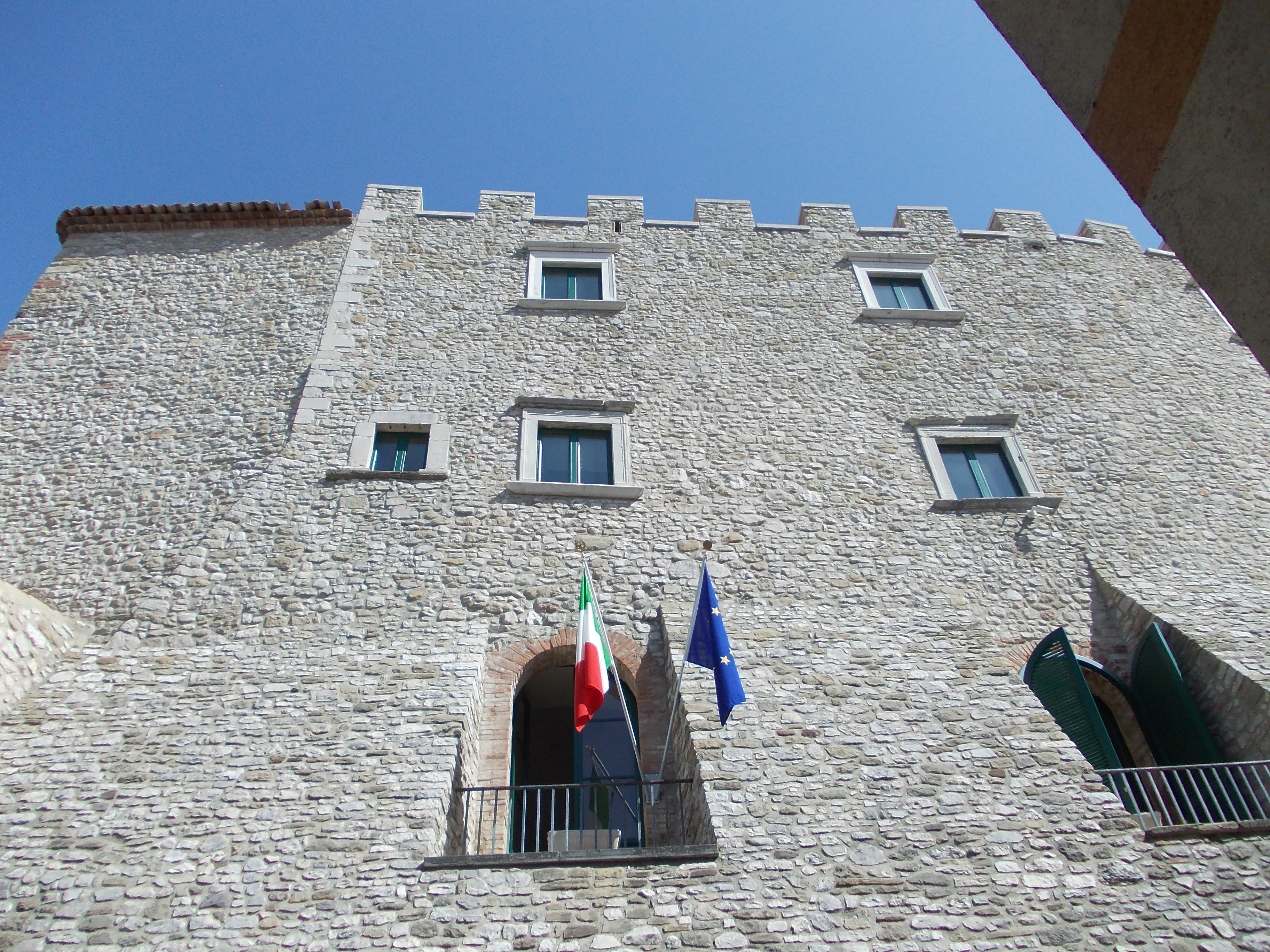 Castello di Capua - MIBAC This is a photo of a monument which is part of cultural heritage of Italy.